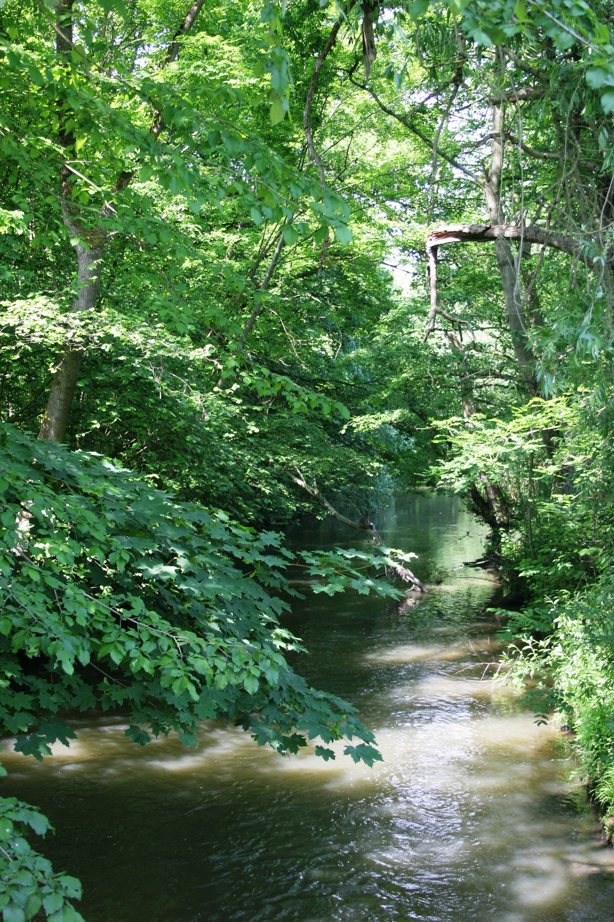 D'Geul an der Griecht laanscht de Bëschhank De Dellen tëscht Geulhem a Meerssen.